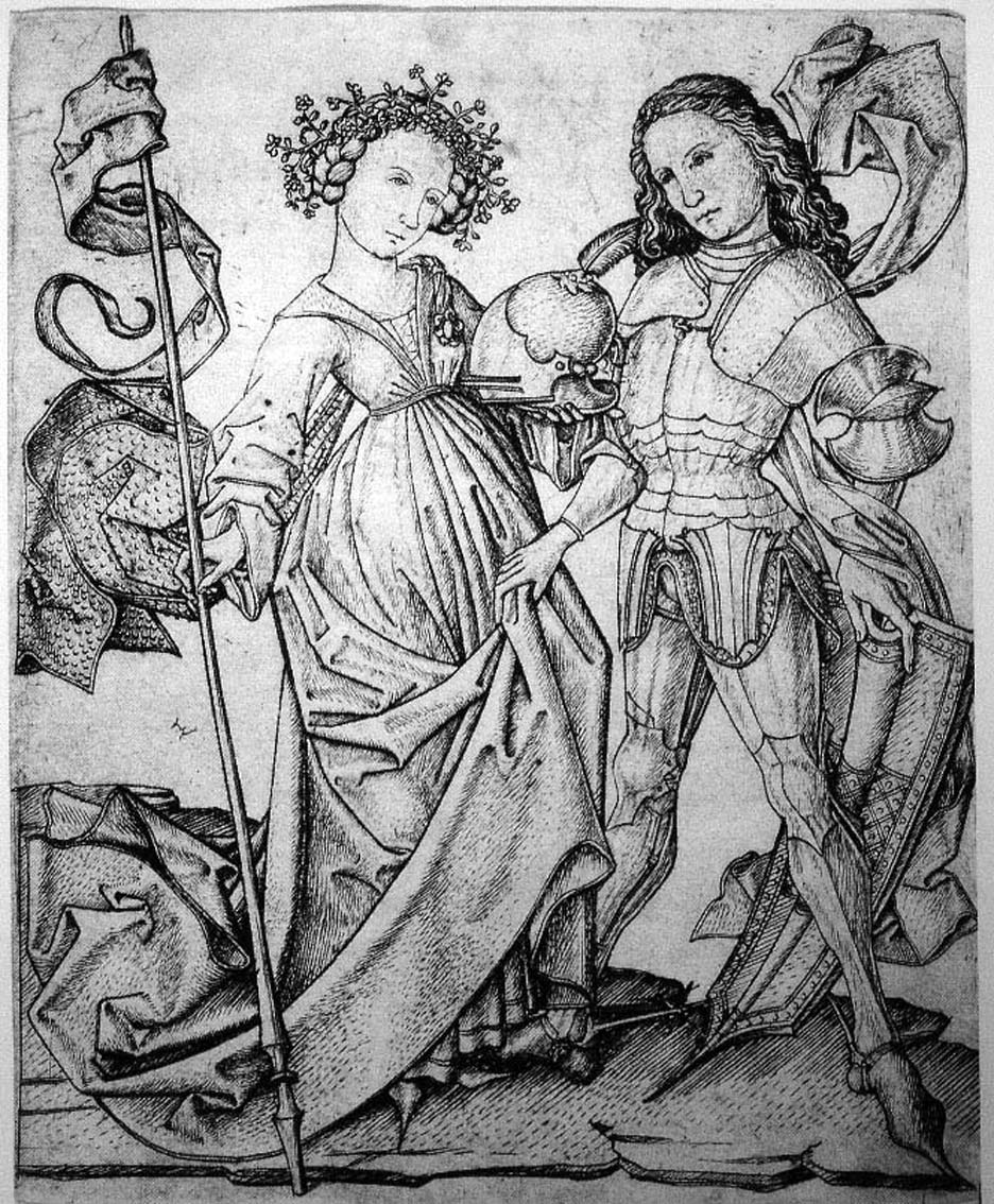 Ritter und Dame mit Helm und Lanze L.212